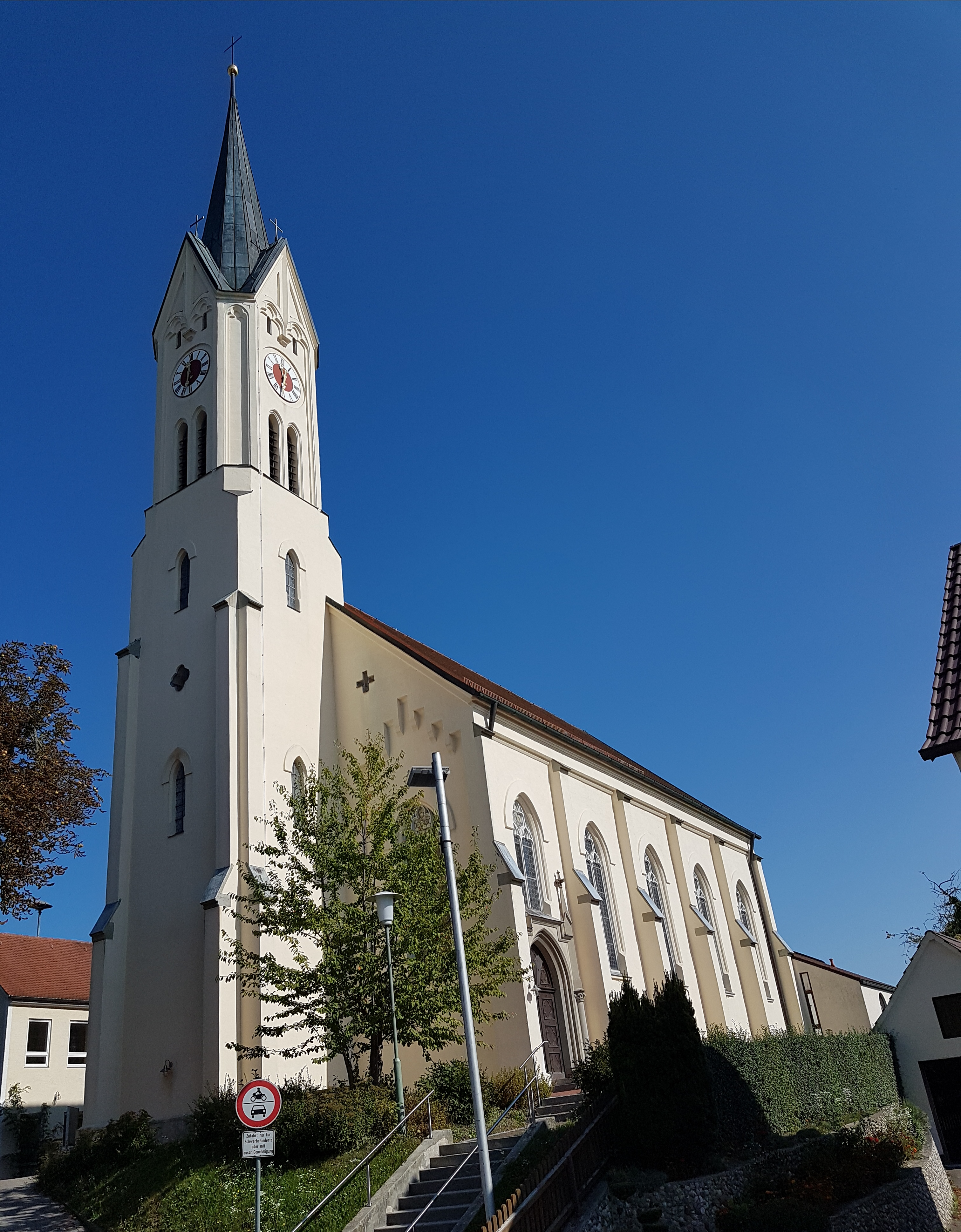 Ried bei Mering, Pfarrkirche St